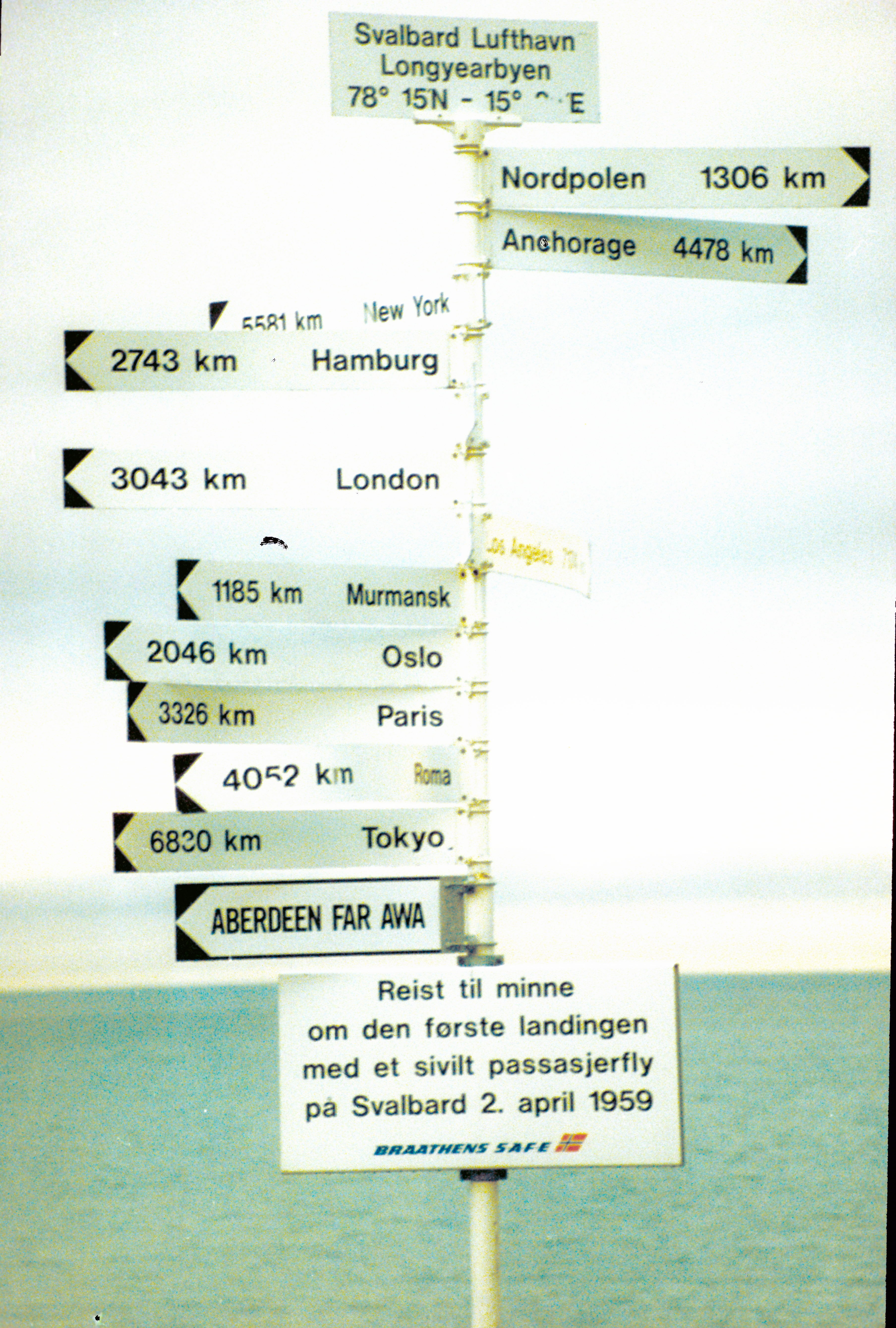 Hinweisschild Longyearbyen Airport West-Spitzbergen